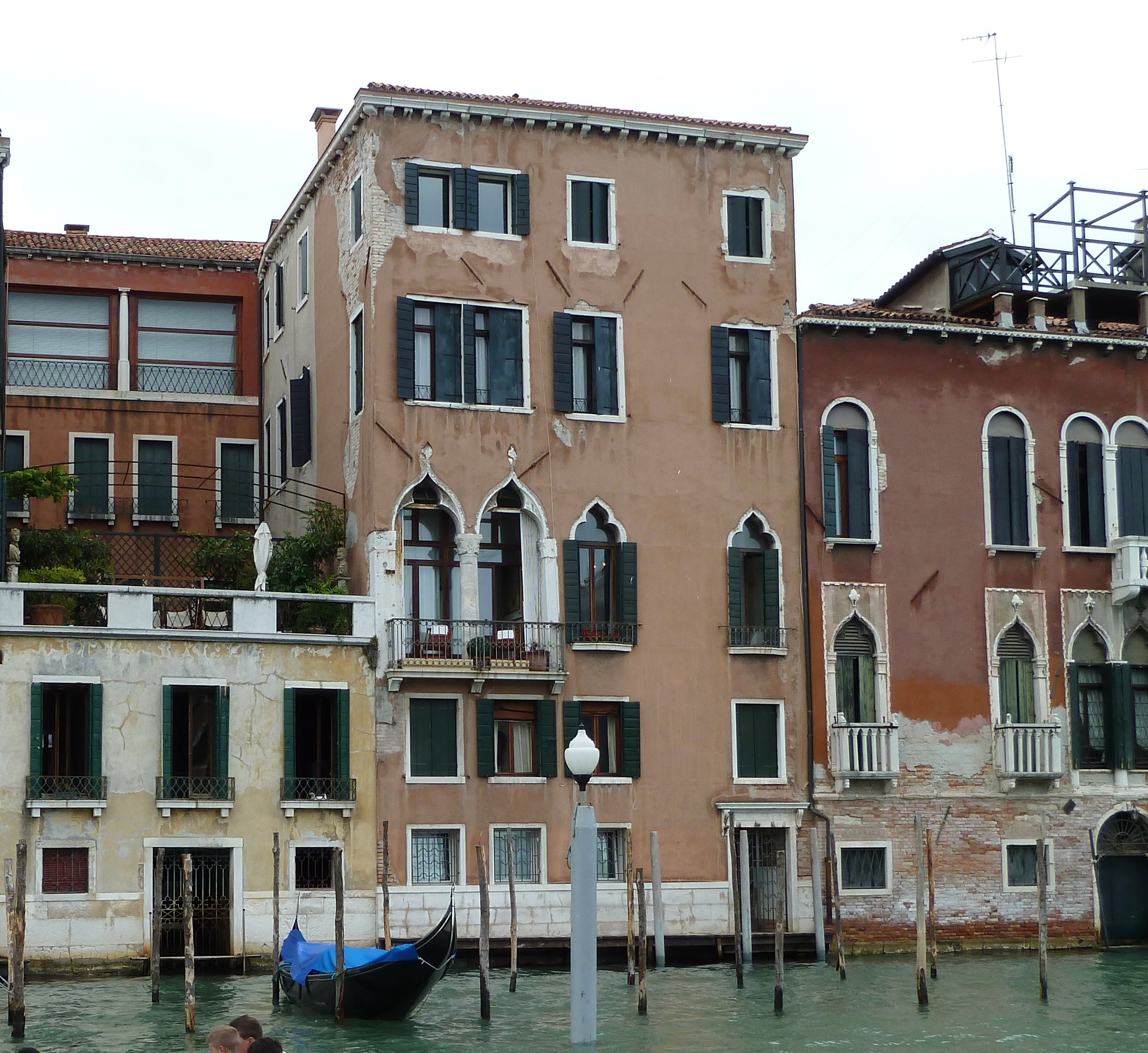 Ca' Tiepoletto Passi (Venice)